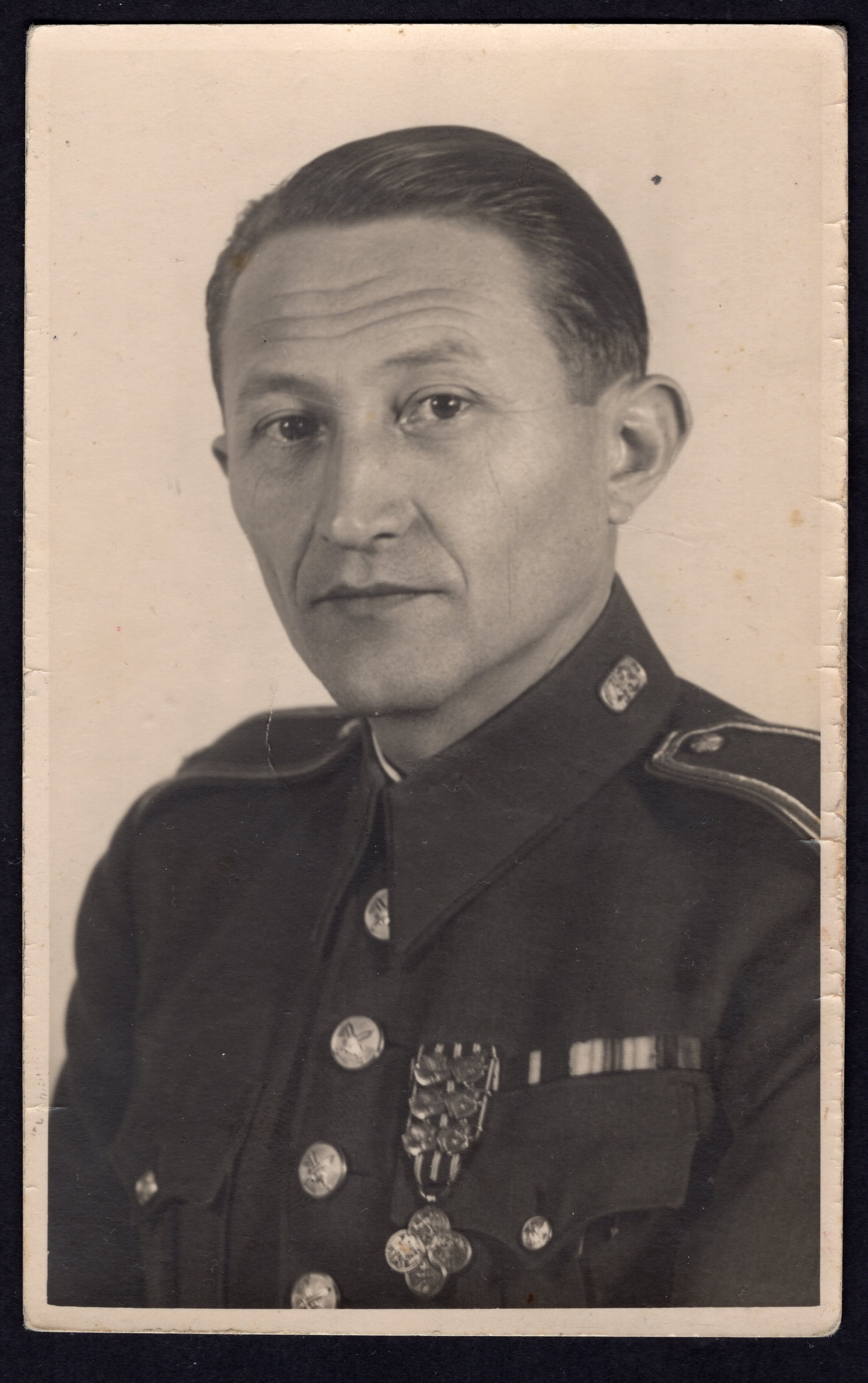 Major letectva RNDr. Josef JEDLIČKA (narozen 9. září 1897 v Budapešti), před druhou světovou válkou zpravodajský důstojník Leteckého pluku 1 v Praze - Kbelích. Za německé okupace působil zpravodajsky pro SSSR. Byl zastřelen v Praze - Kobylisích dne 30. června 1942. (Národní archiv (NA), fond "Úřad říšského protektora" (dále jen Archiv ministerstva vnitra - AVM 114), signatura 114-10-1, "Zpráva o zastřelení 71 osob odsouzených stanným soudem v Praze dne 30. června 1942"). RNDr. Josef Jedlička na portrétní fotografii v hodnosti štábního kapitána v první polovině 30. let dvacátého století. Archiv Jiřího Strašila mladšího. Autor fotografie není znám.